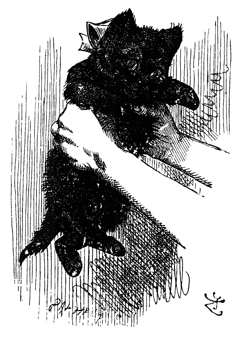 гравюра Джон Тенниел